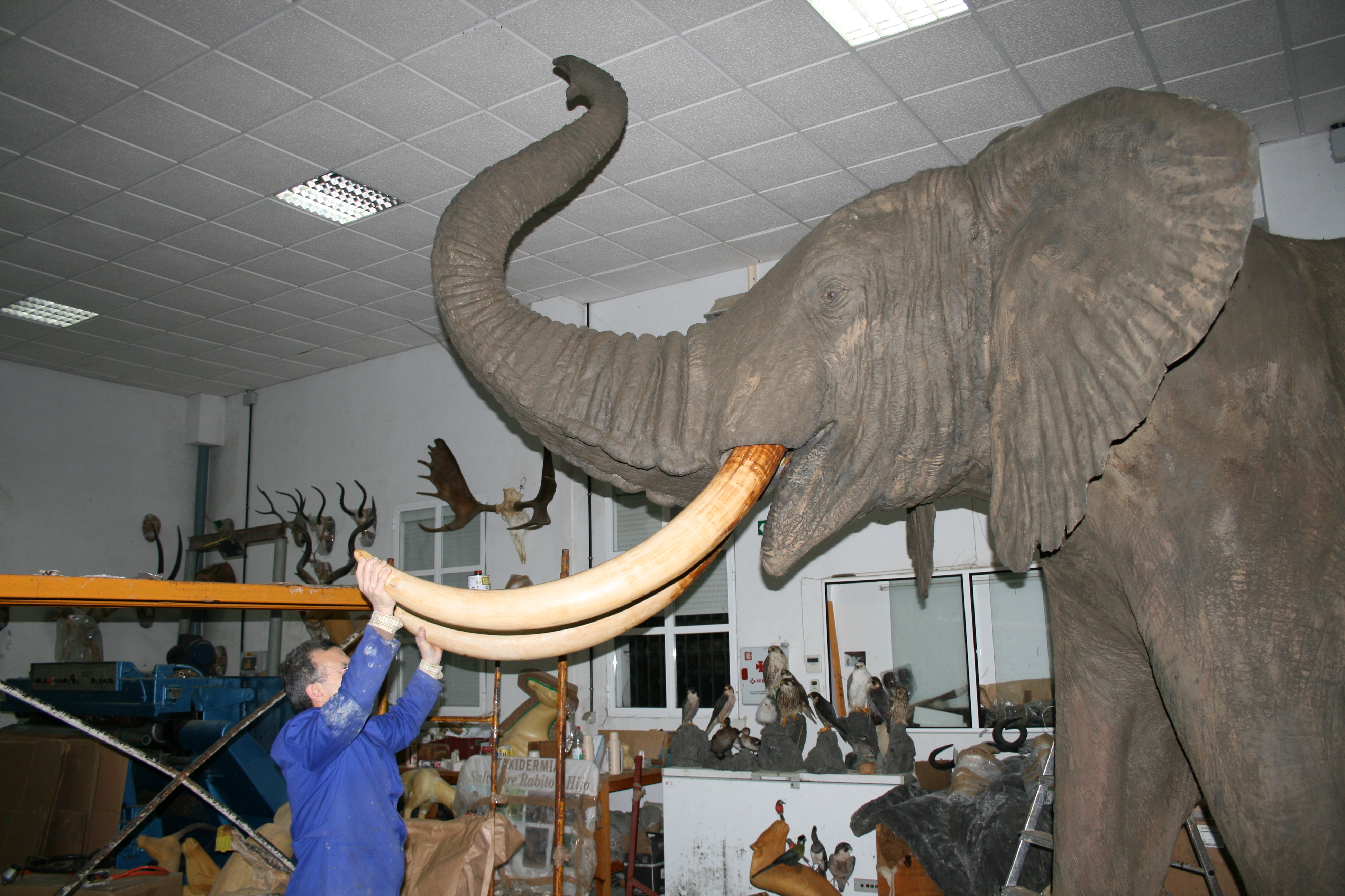 Elefante naturalizado por Salvatore Rabito